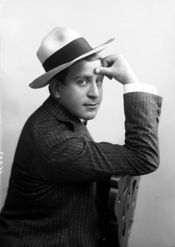 Armando Falconi fotografato da Mario Nunes Vais